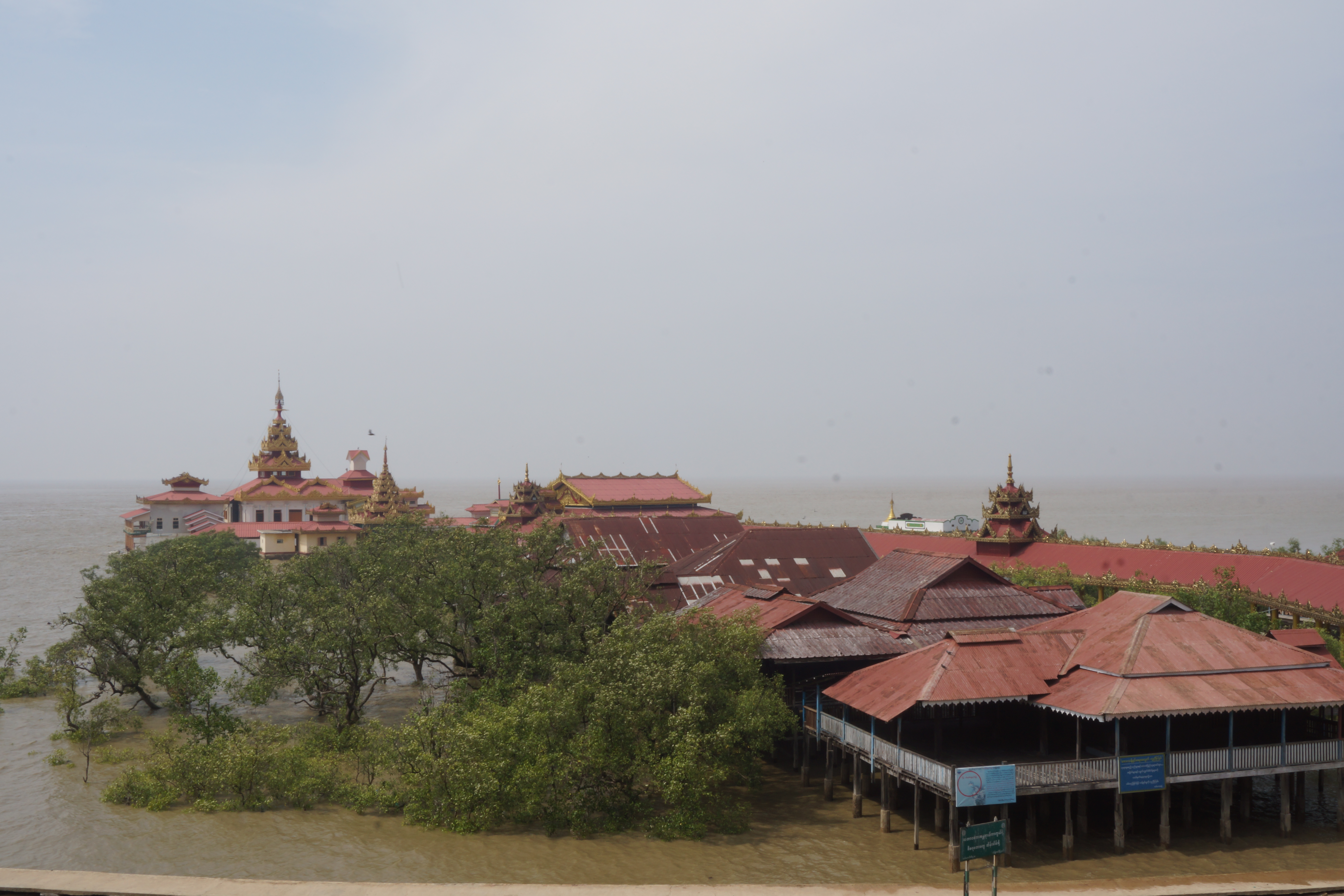 Kyaikkhami, Myanmar (Burma)